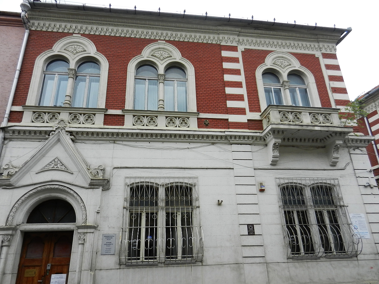 Casă, azi birouri ale Comunității evreiești